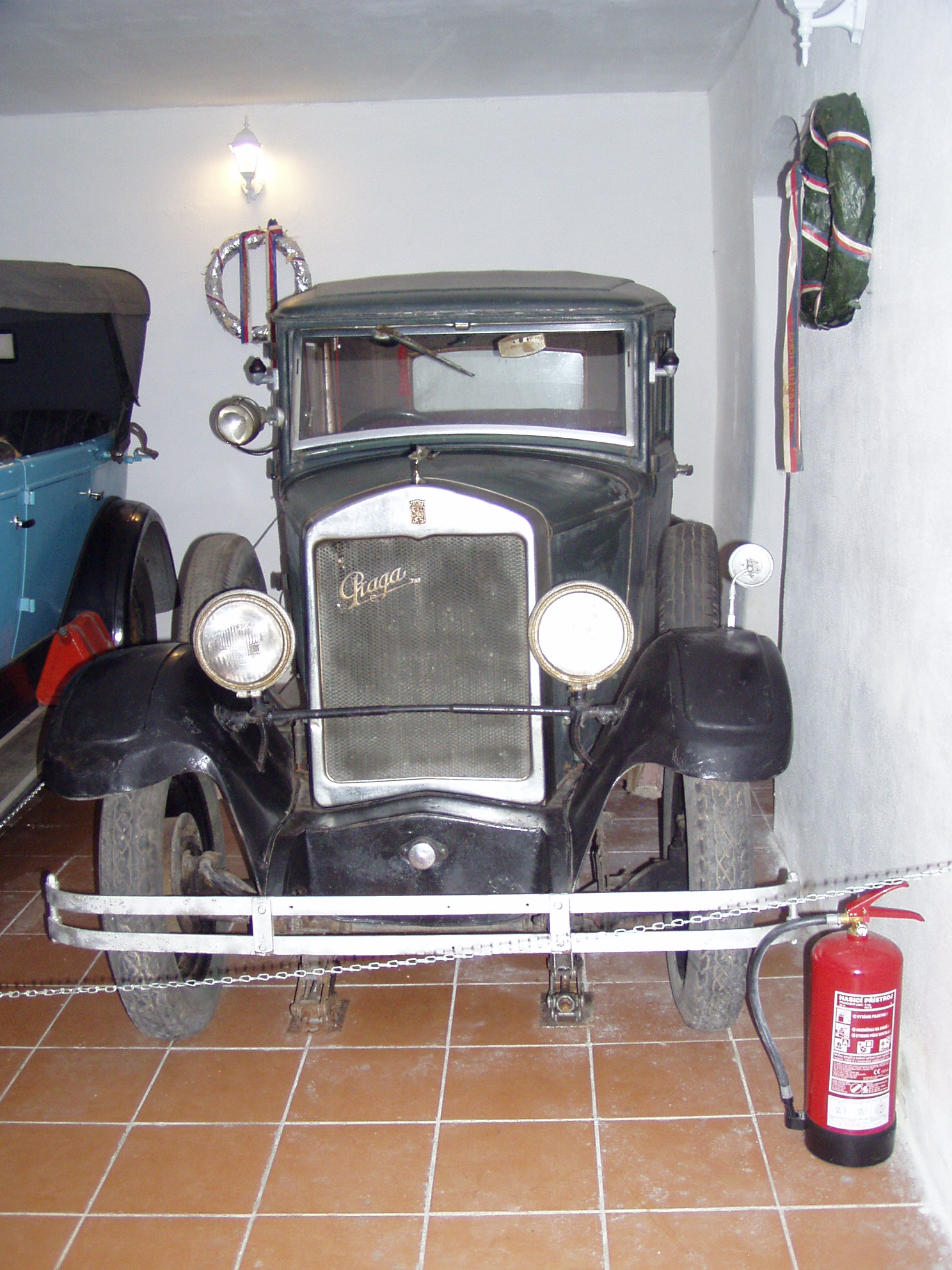 Praga Piccolo (1930)